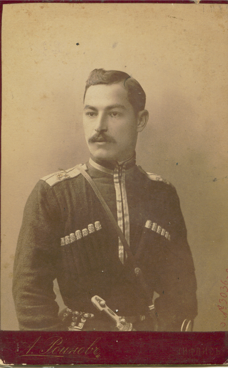 დავით ვაჩნაძე (დავით ვაჩნაძე - ეროვნულ-განმათავისუფლებელი მოძრაობის დიდი მოამაგე, ეროვნულ-დემოკრატიული პარტიის ერთ-ერთი დამაარსებელი და წინამძღოლი). ერმაკოვის კატალოგი;3036. ფოტო გადაღებულია თბილისში. გადაღების თარიღი უცნობია.